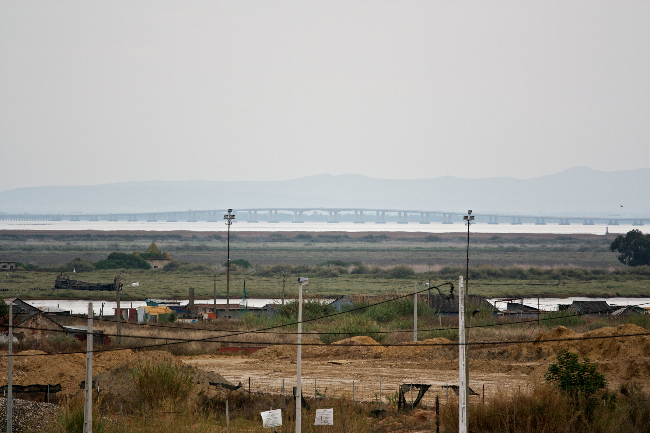 Rio Tejo junto a Póvoa de Santa Iria, 2011.11.12.